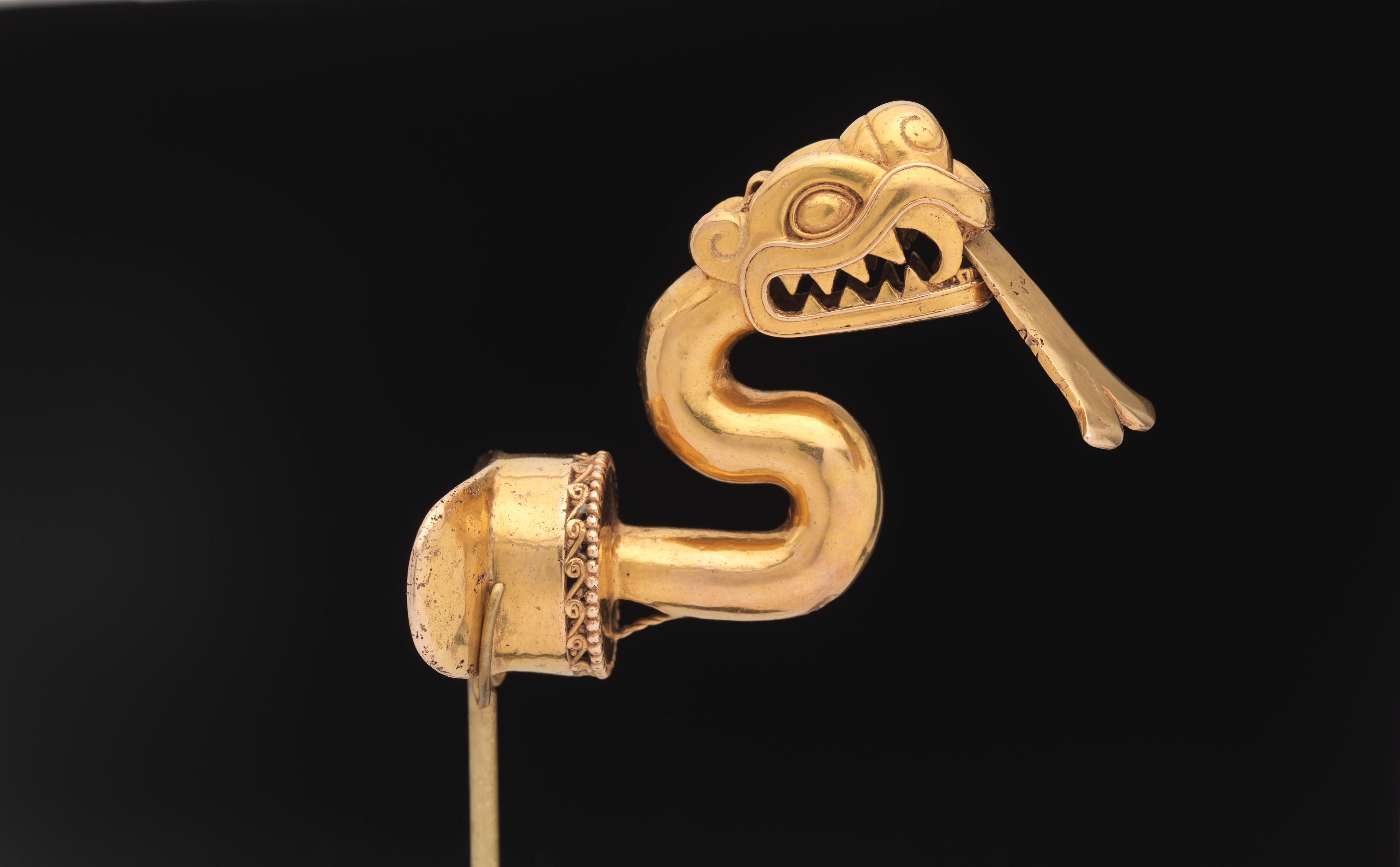 Aztec; Labret; Metal-Sculpture